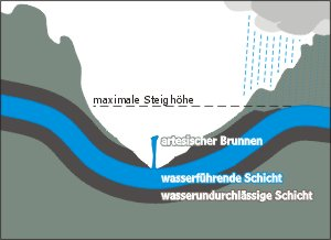 Darstellung zeigt einen artesischen Brunnen